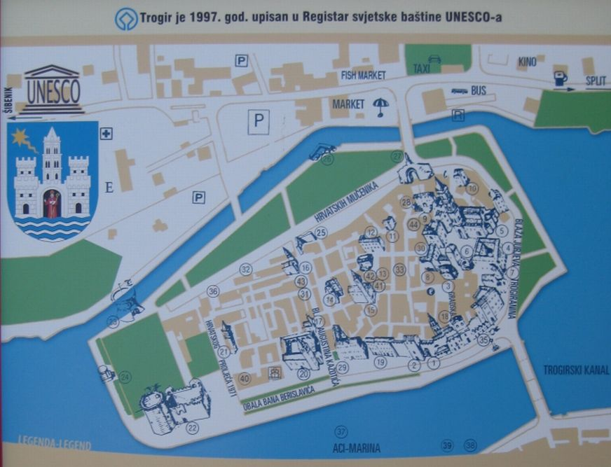 Plan grada Trogira, Croatia